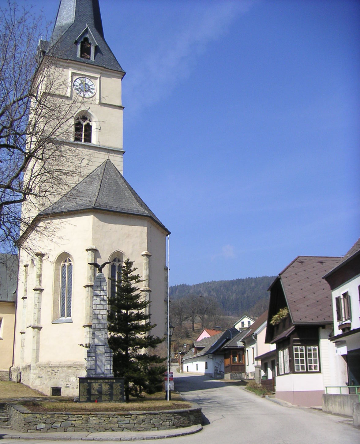 Pfarrkirche Guttaring mit Ortskern